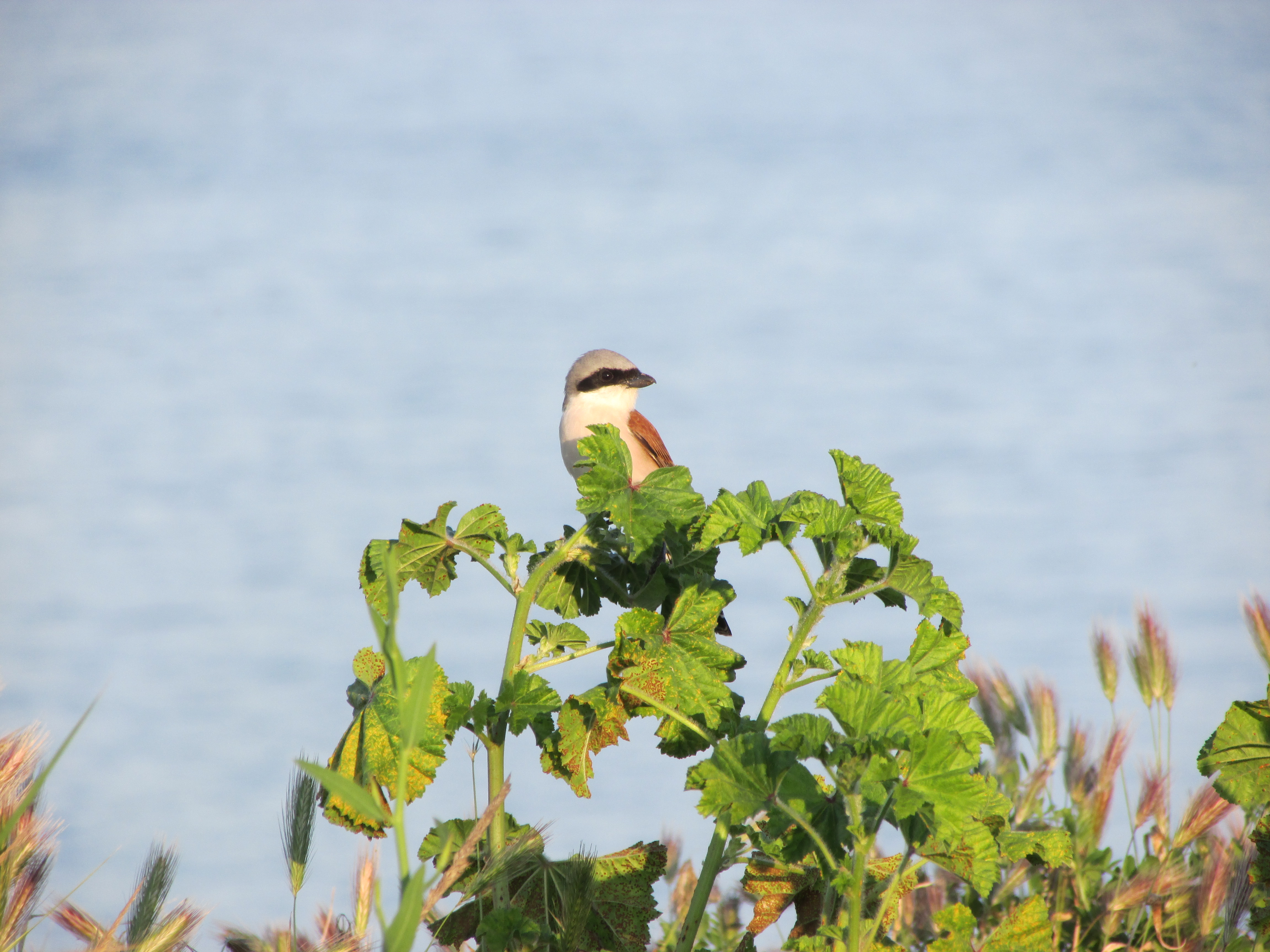 «Острів Зміїний», Кілійський р-н, о. Зміїний